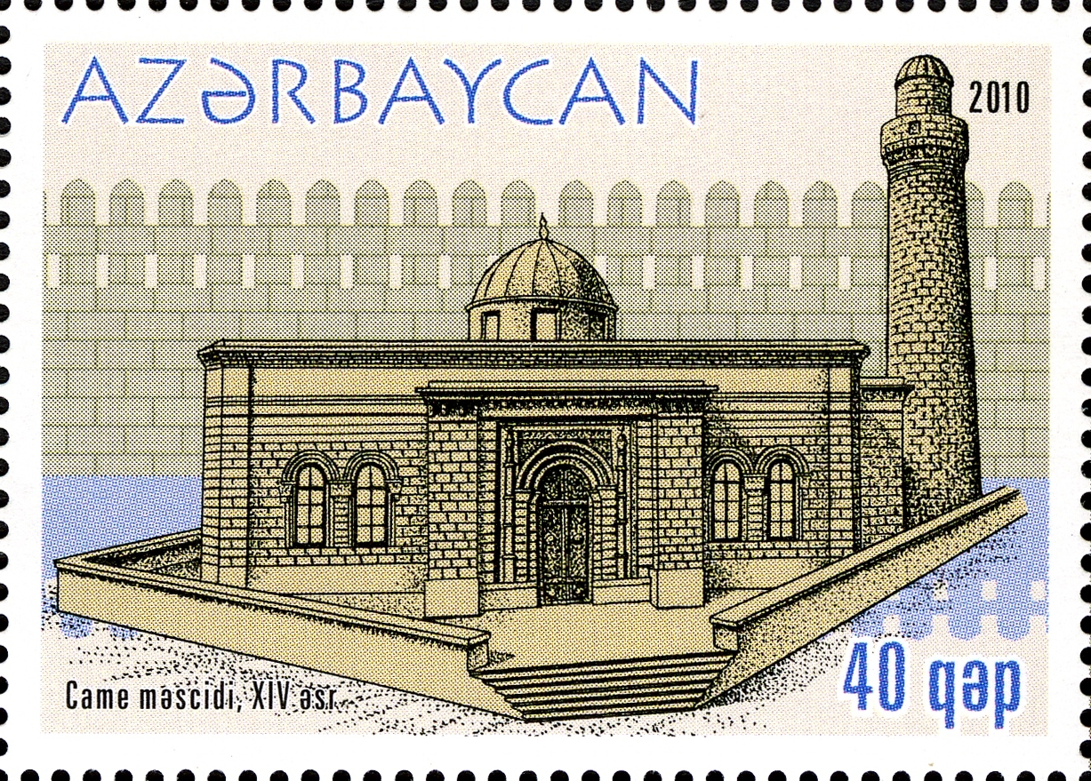 İçəri şəhər